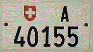 Administration Autonummer